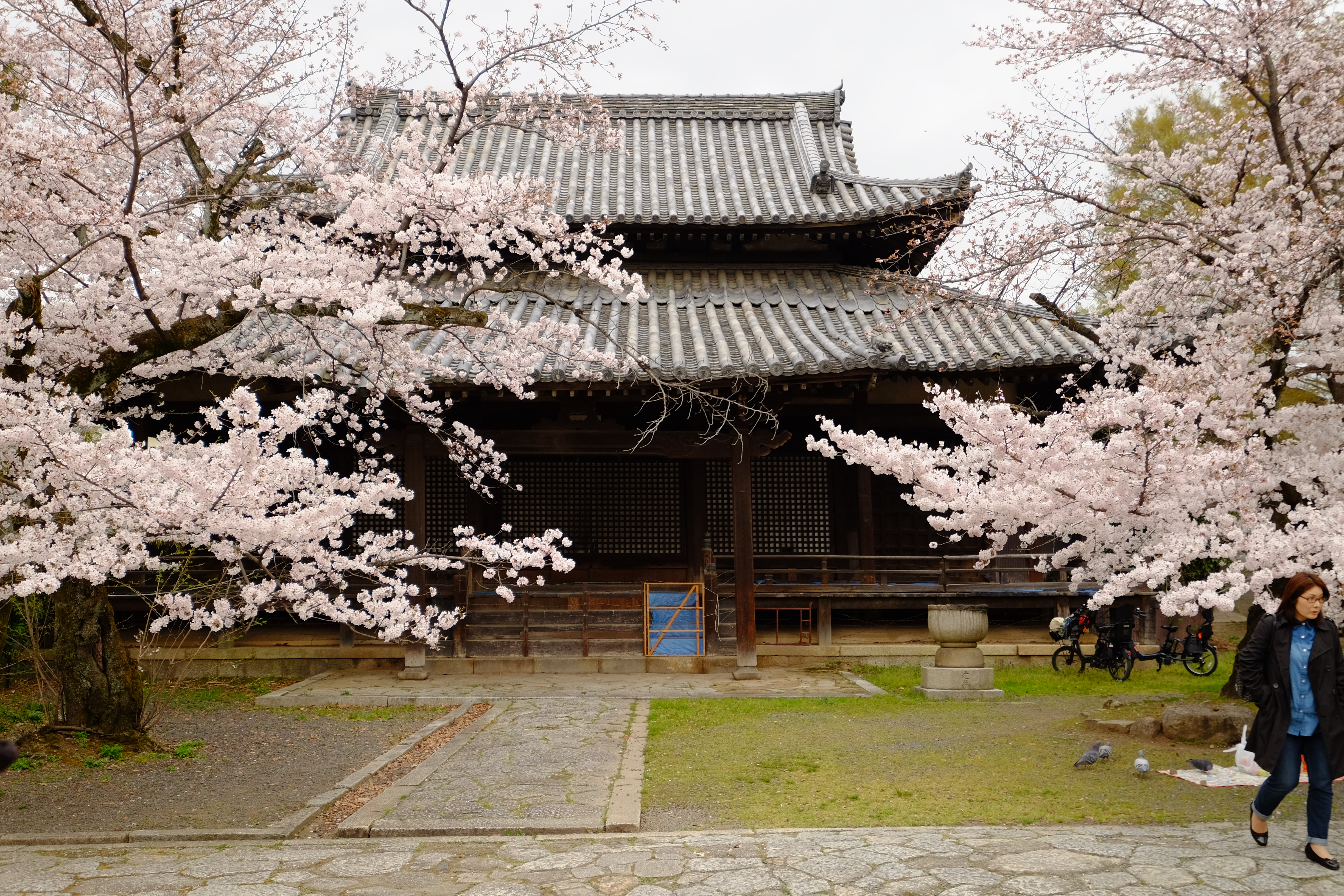 2016年9月に壊す予定の立本寺祖師堂の写真